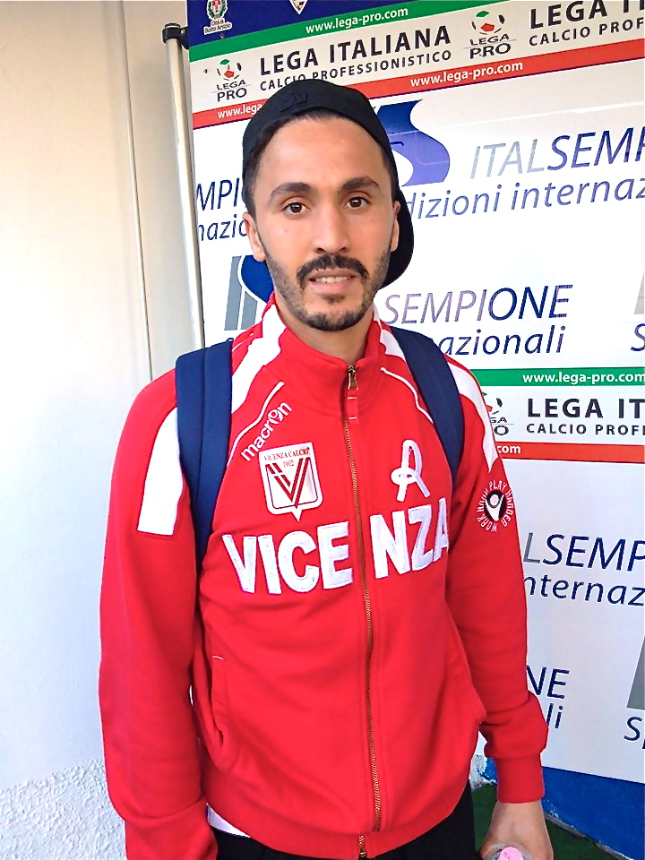 Abderazzak Jadid, calciatore marocchino, prima di Pro Patria-Vicenza, 23 febbraio 2014